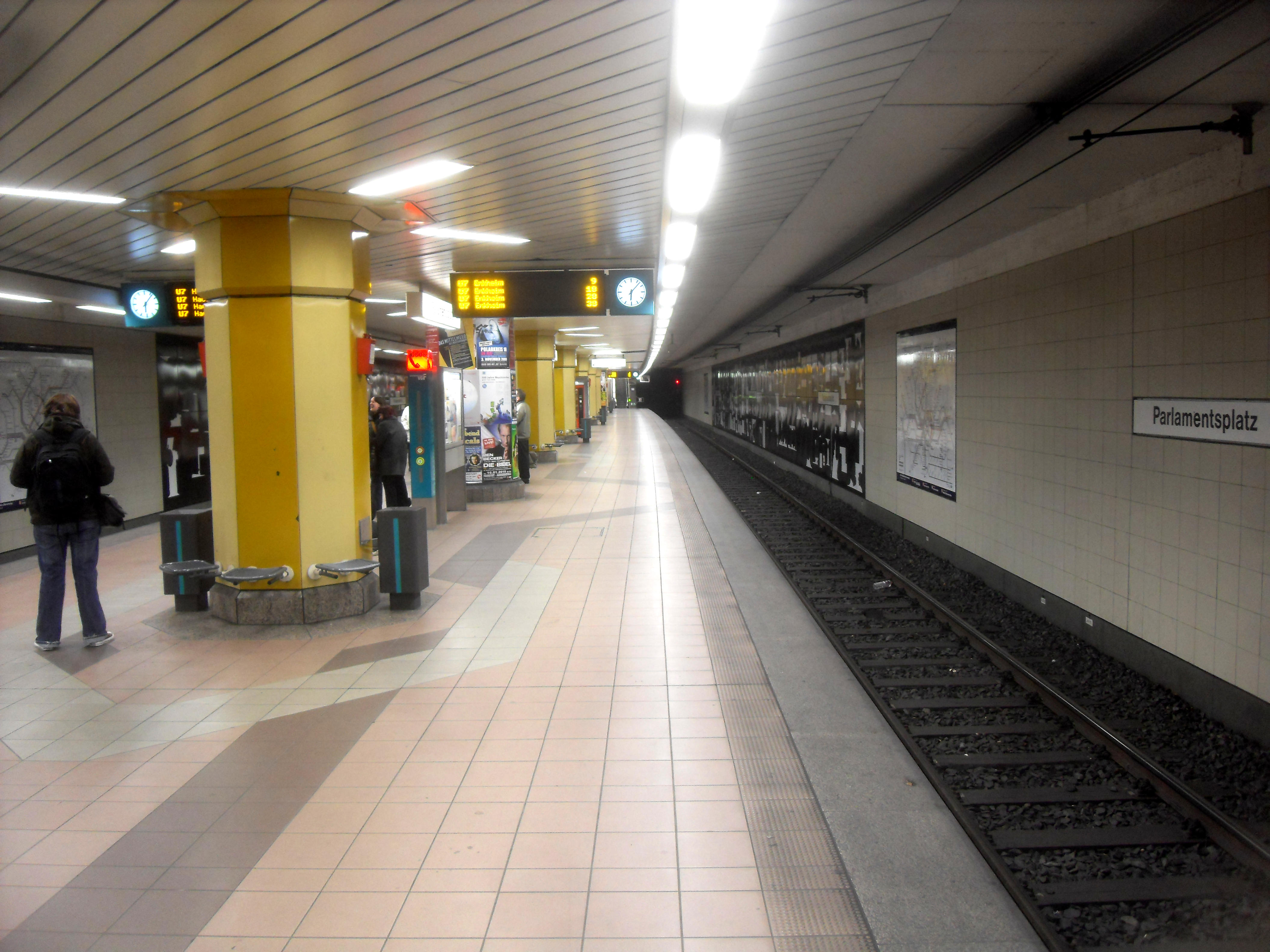 Bahnsteig des U-Bahnhofs Parlamentsplatz (Richtung Enkheim) der U-Bahn Frankfurt auf der Linie U 7 in Hessen (Deutschland)